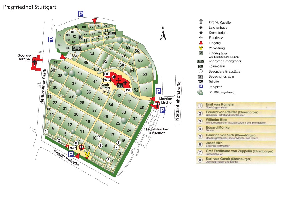 Pragfriedhof in Stuttgart-Nord Übersichtskarte